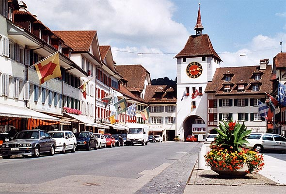 Unteres Tor von Willisau-Stadt